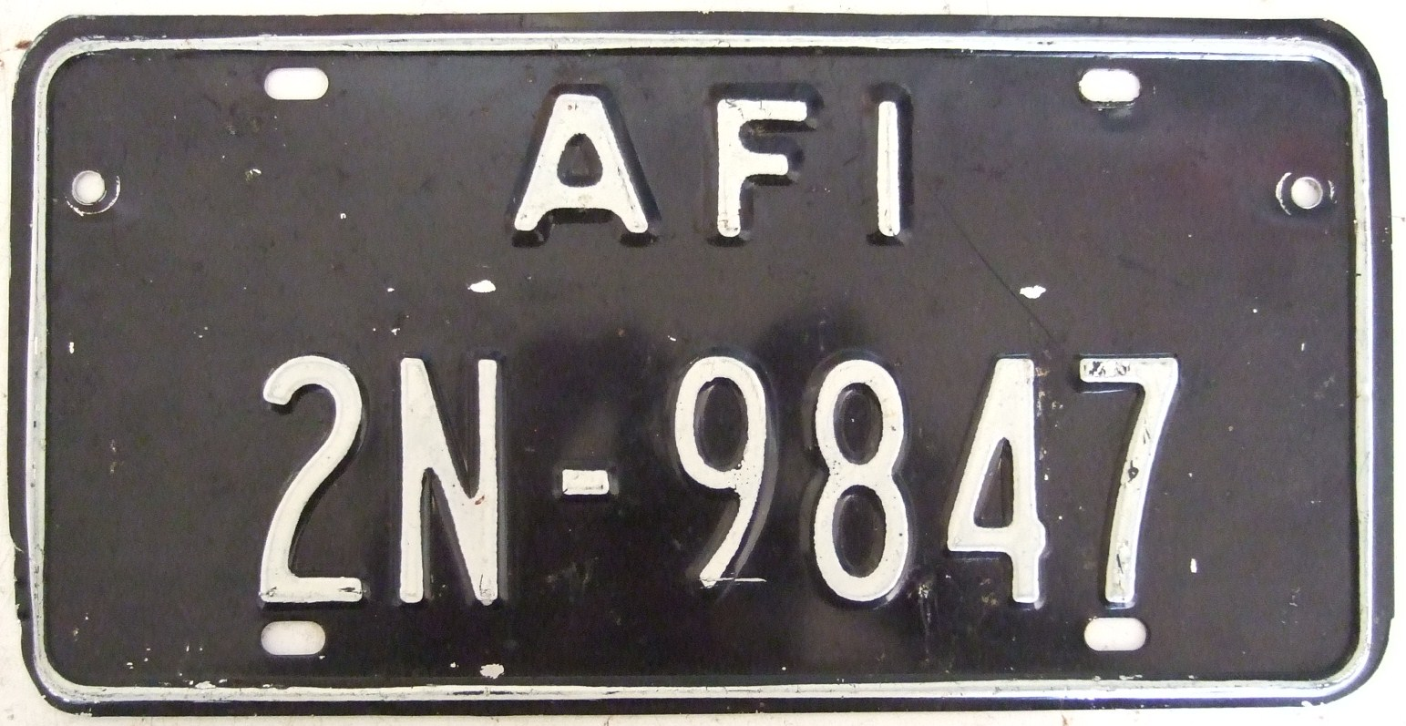 ALLIED FORCES ITALY 1968 SERIES---BLACK PLATE FOR SECOND VEHICLE